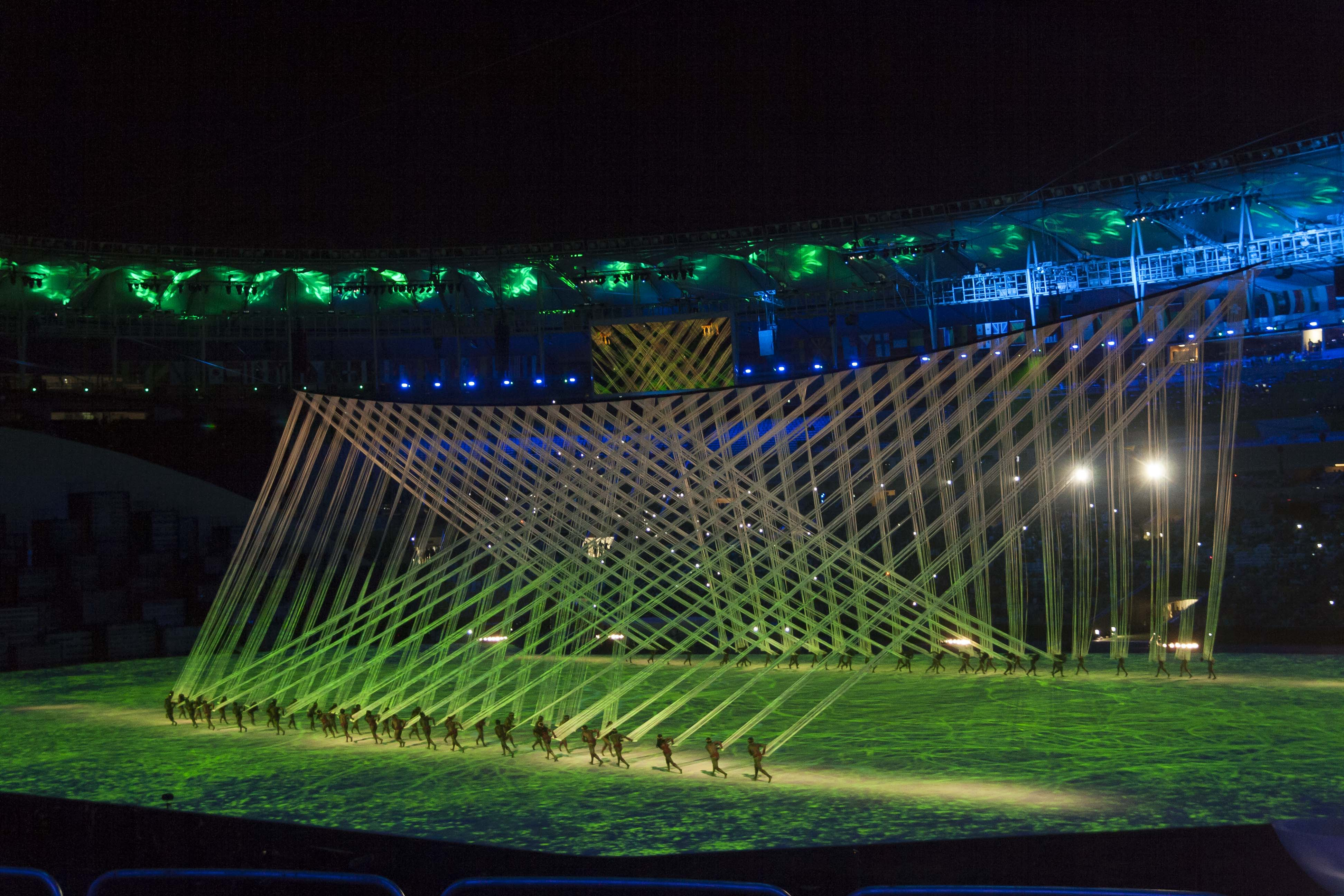 Esta dança indígena foi a melhor parte da cerimonia, simples mas cheia de emoção